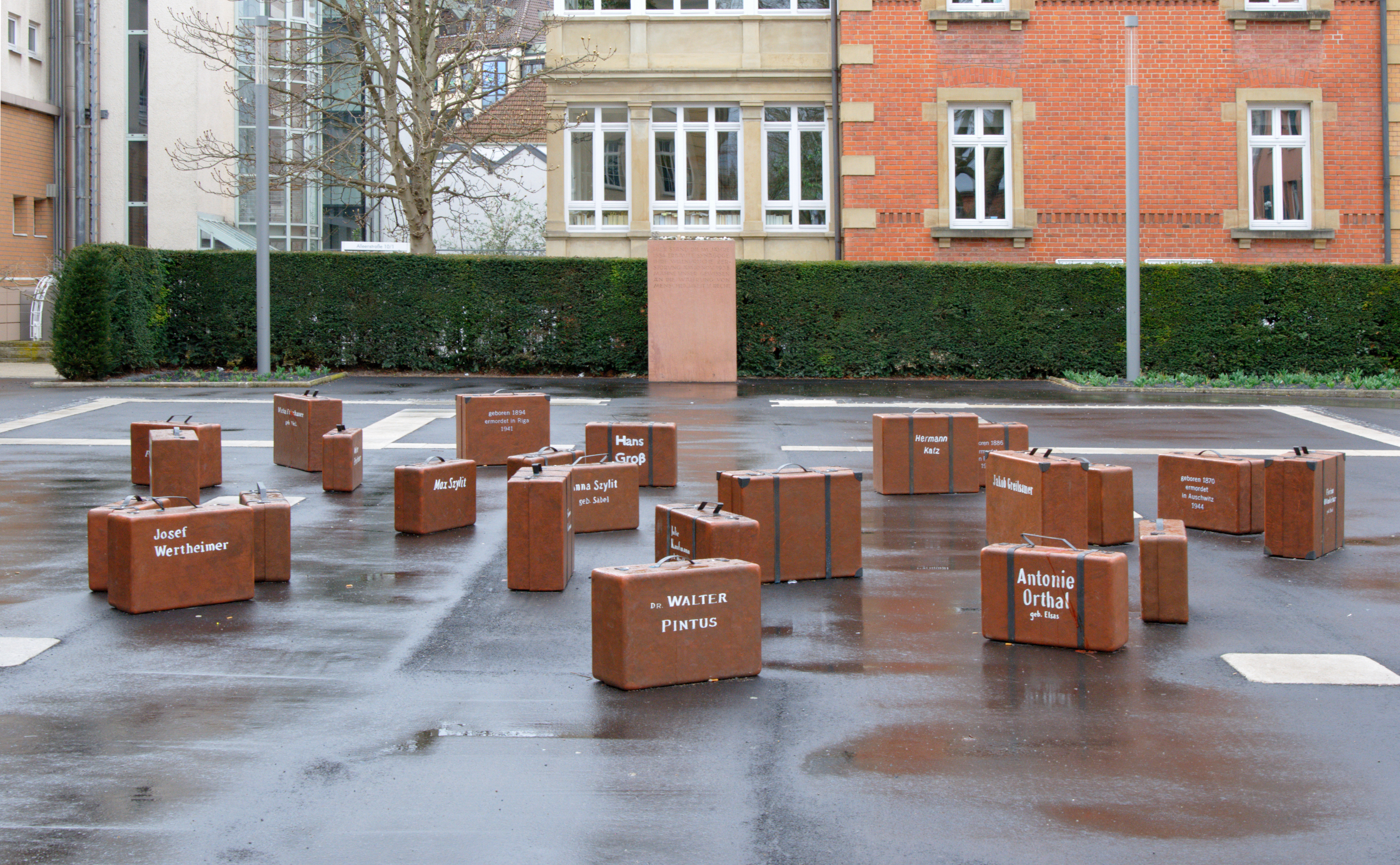 Mahnmal auf dem Platz der Synagoge in Ludwigsburg